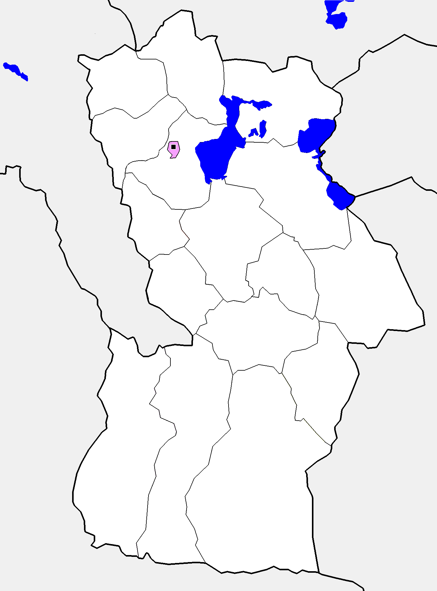 Монгол: Ховдын Жаргалант